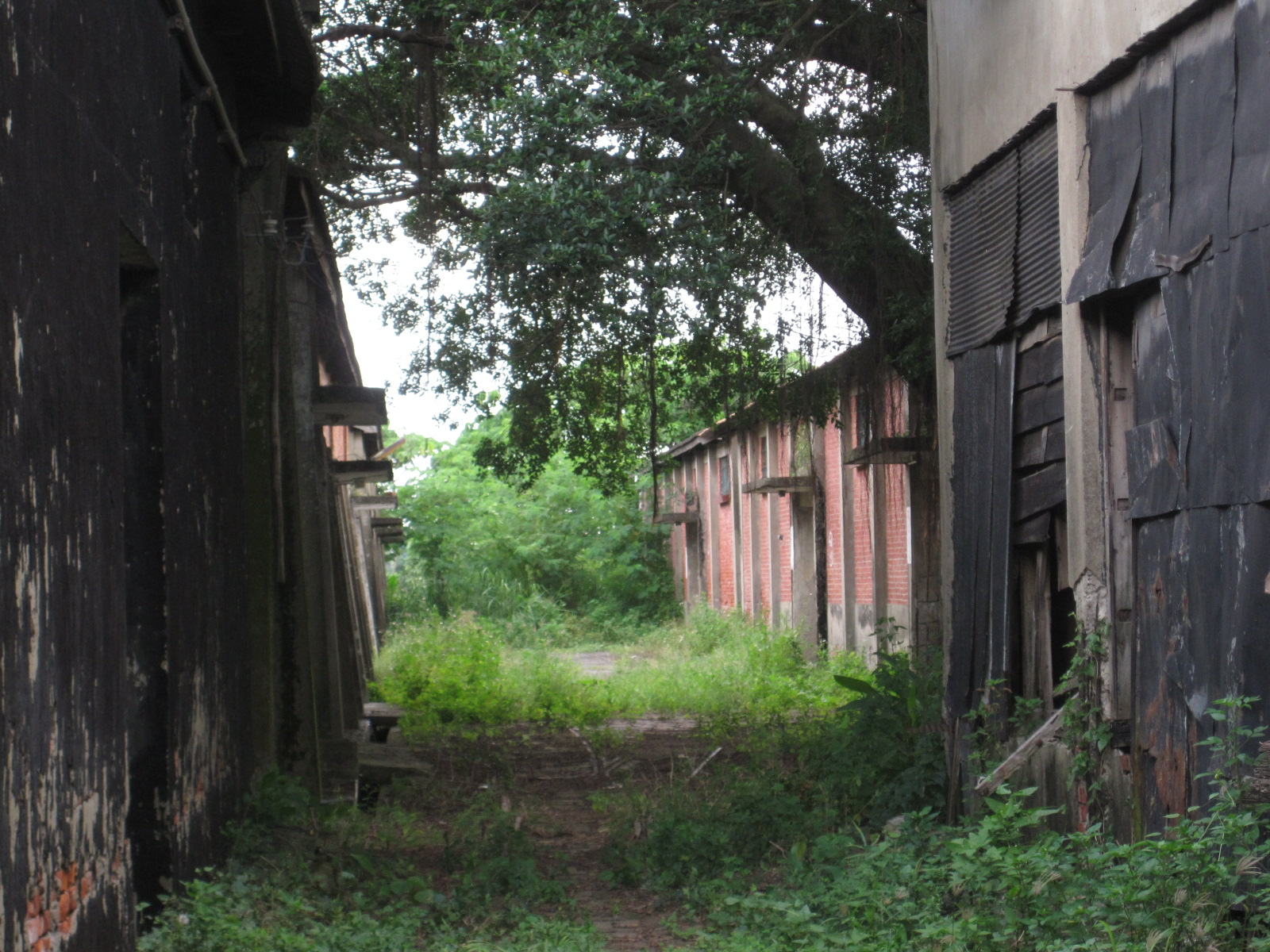 臺鹽隆田儲運站鹽倉